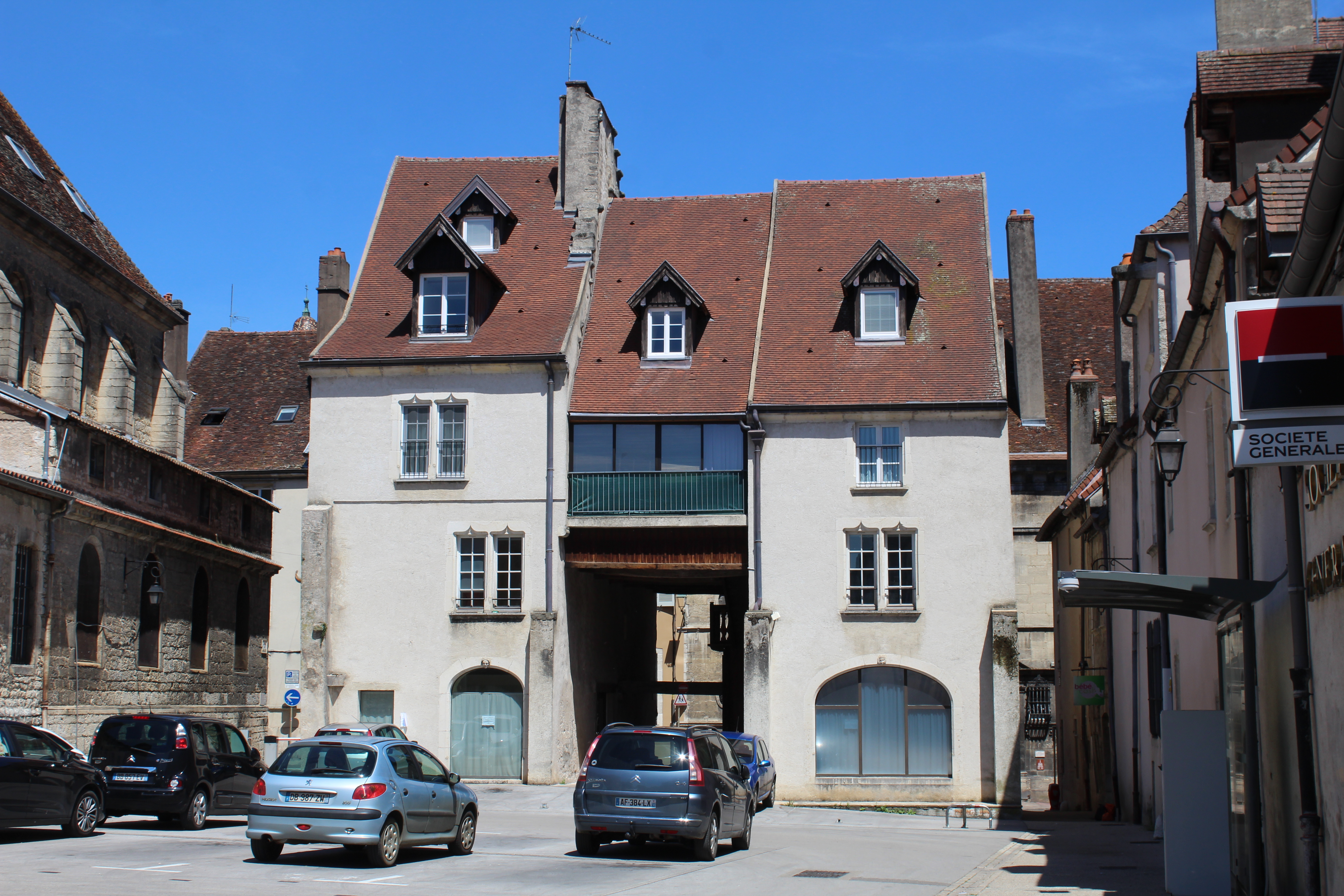 Immeuble, 8-10-12 rue du Mont-Roland, Dole.